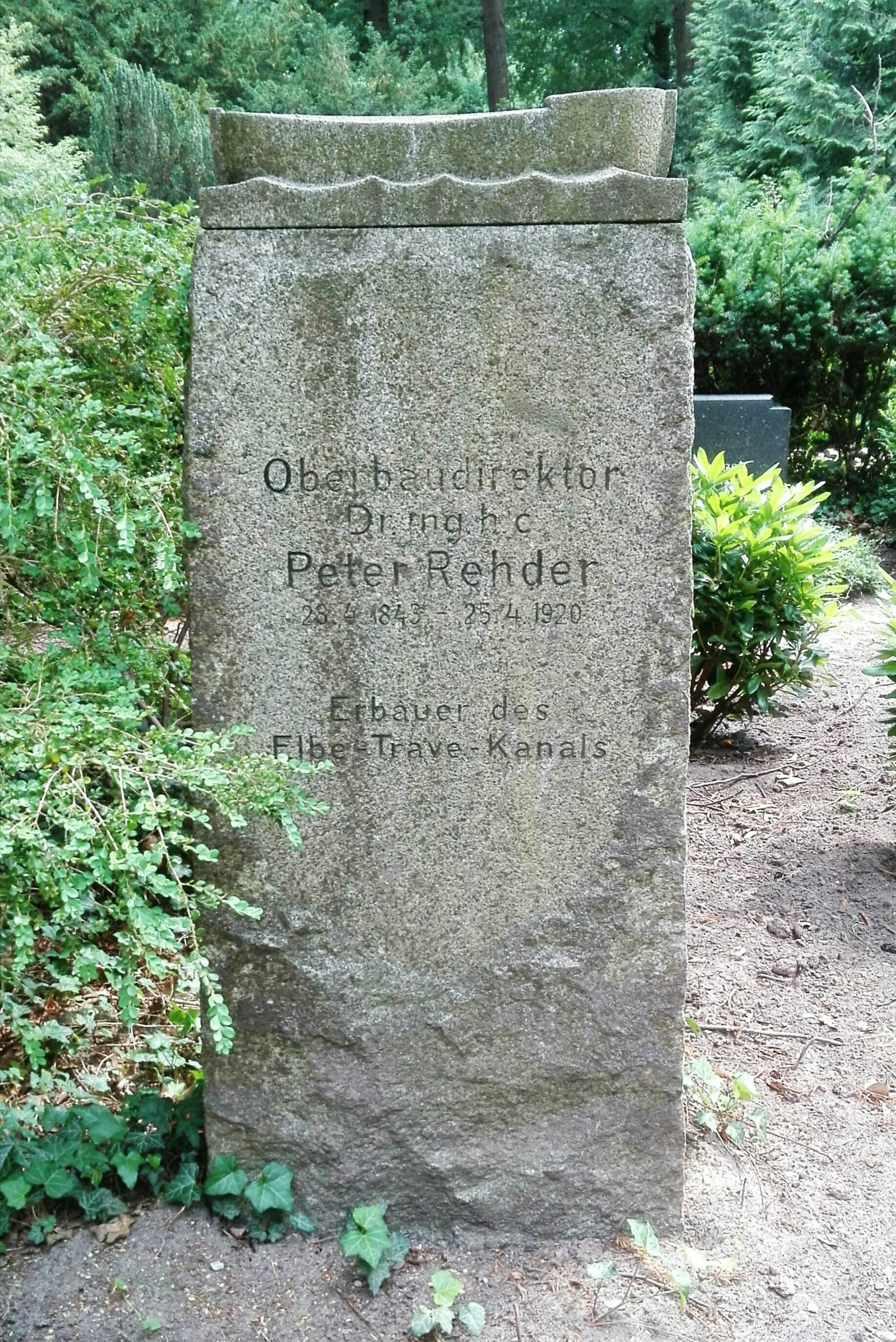 Grabmal von Peter Rehder, Elbe-Trave-Kanal, auf dem Lübecker Burgtorfriedhof.